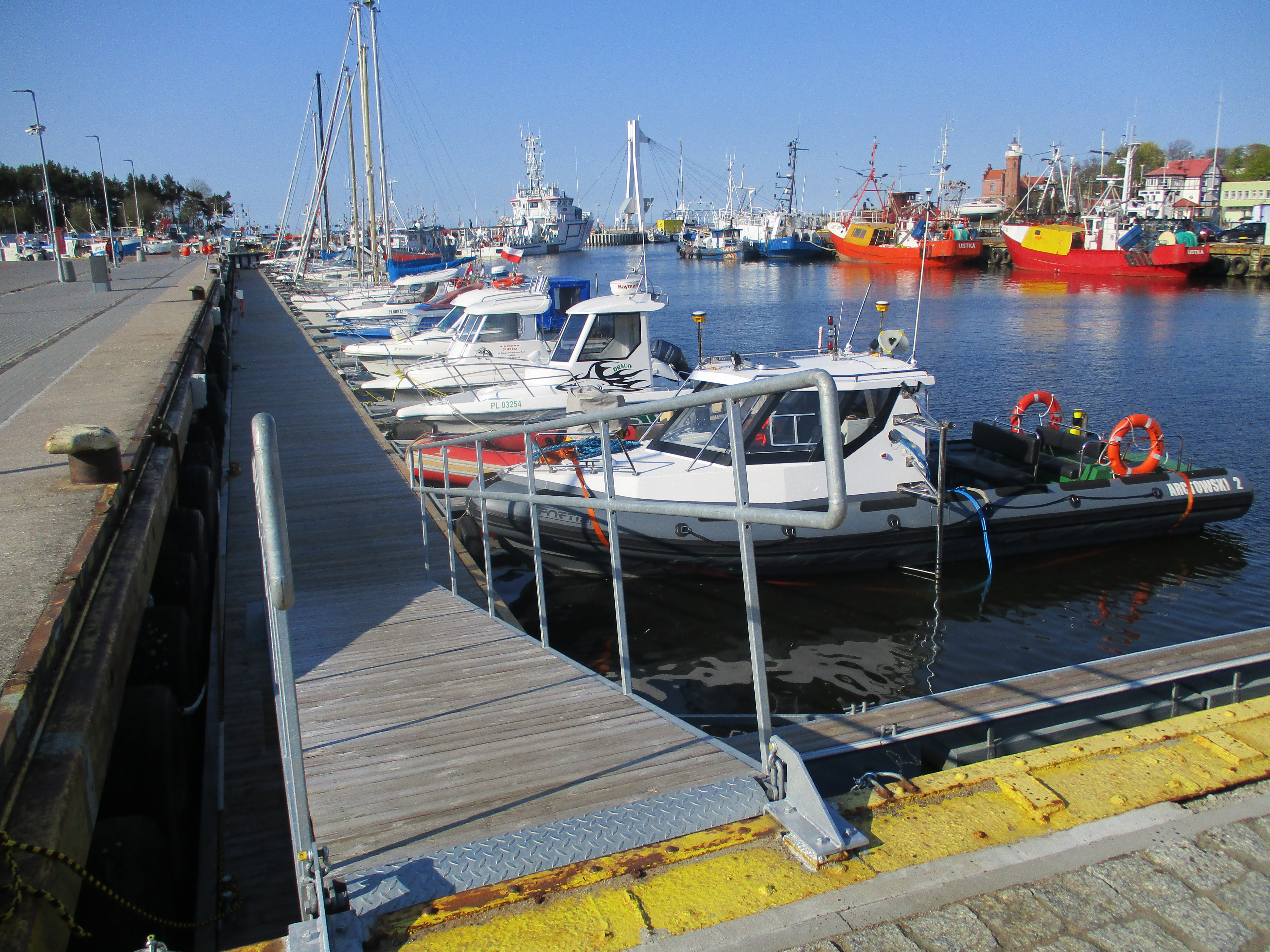 Ustka, port, jachty w basenie węglowym